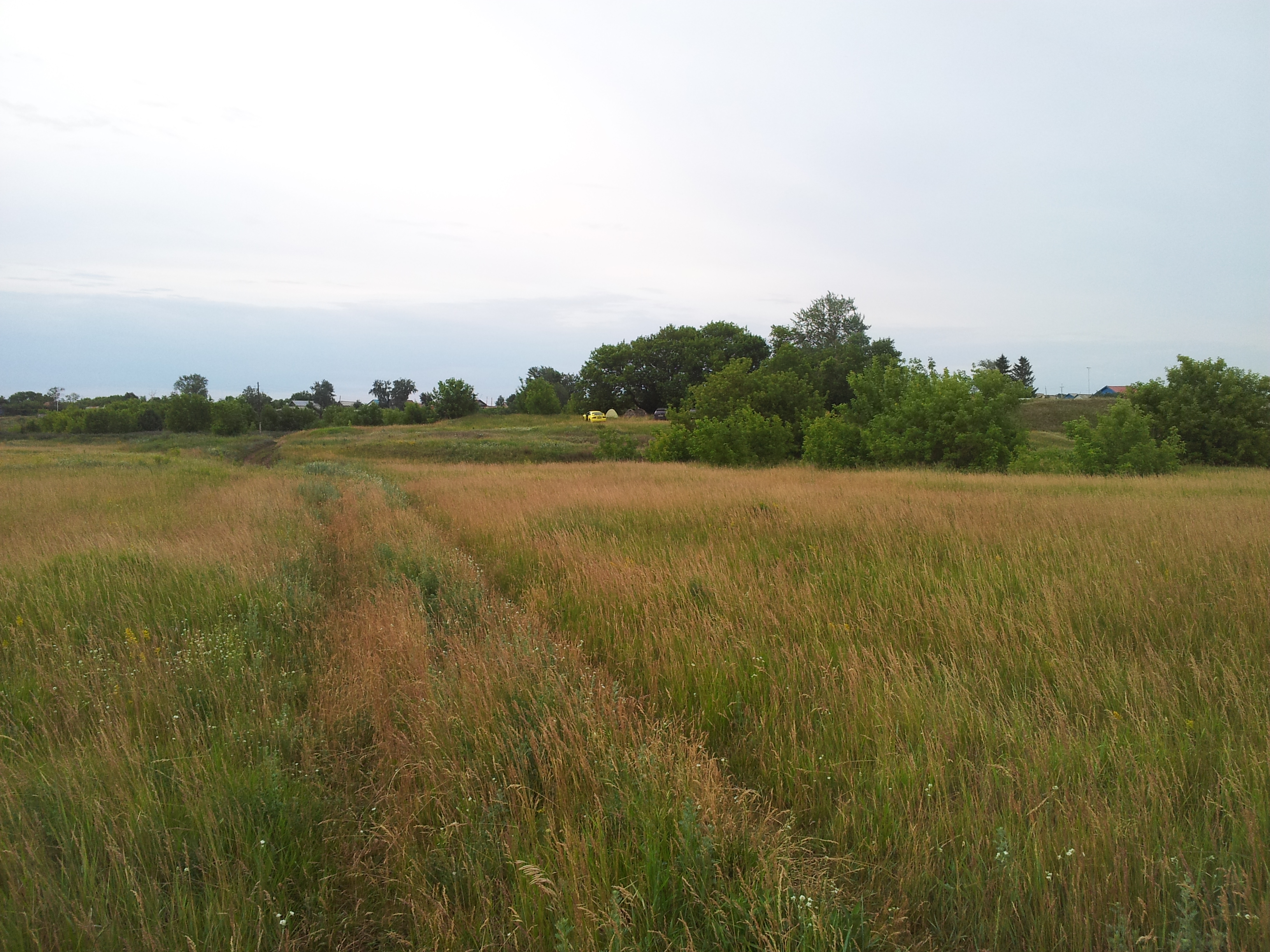 Школьный сад